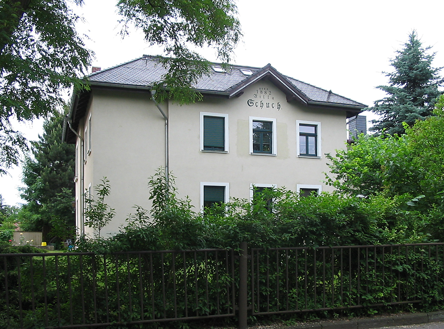 Radebeul, Villa Schuch